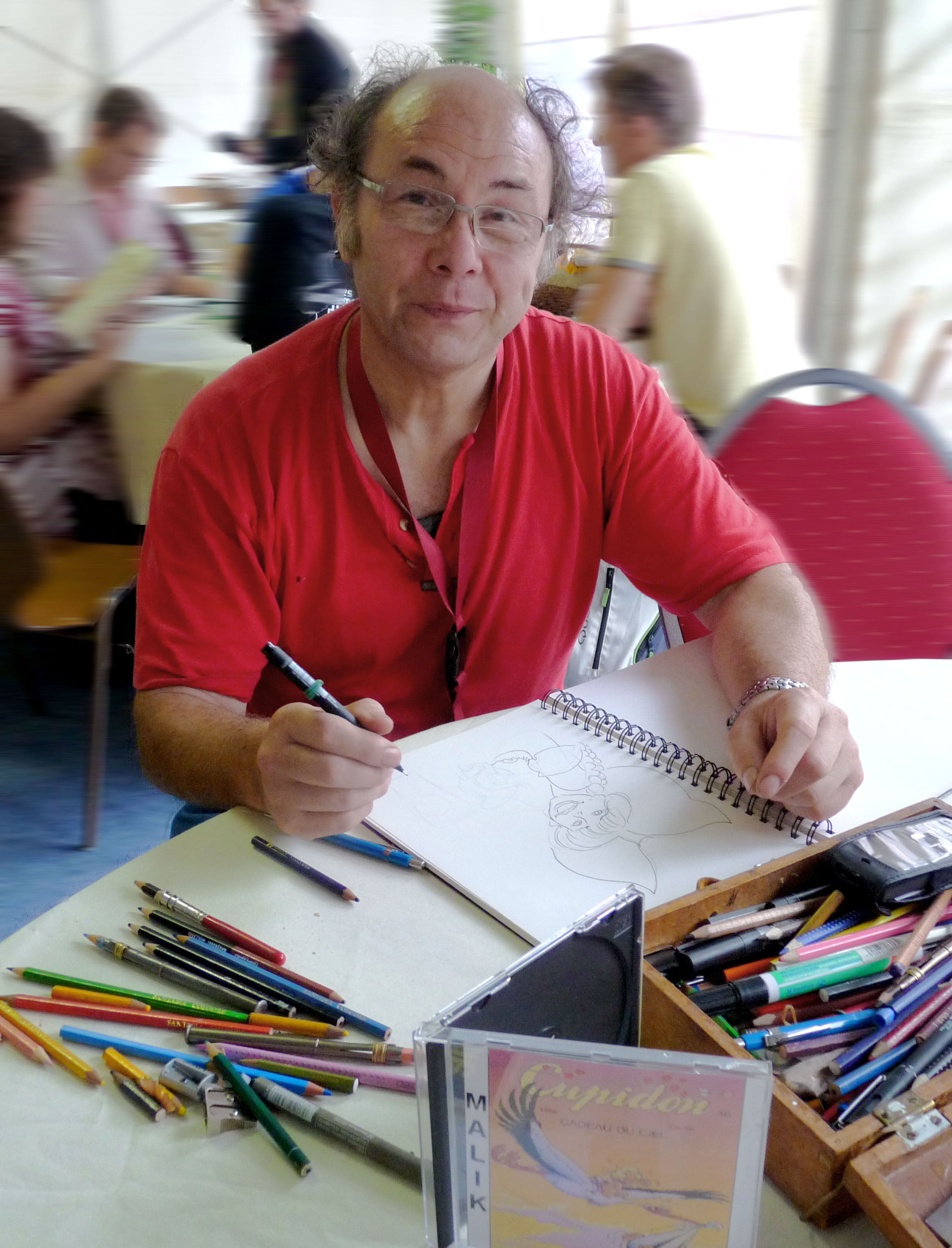 Malick au Festival européen de la bande dessinée Strasbulles 2009